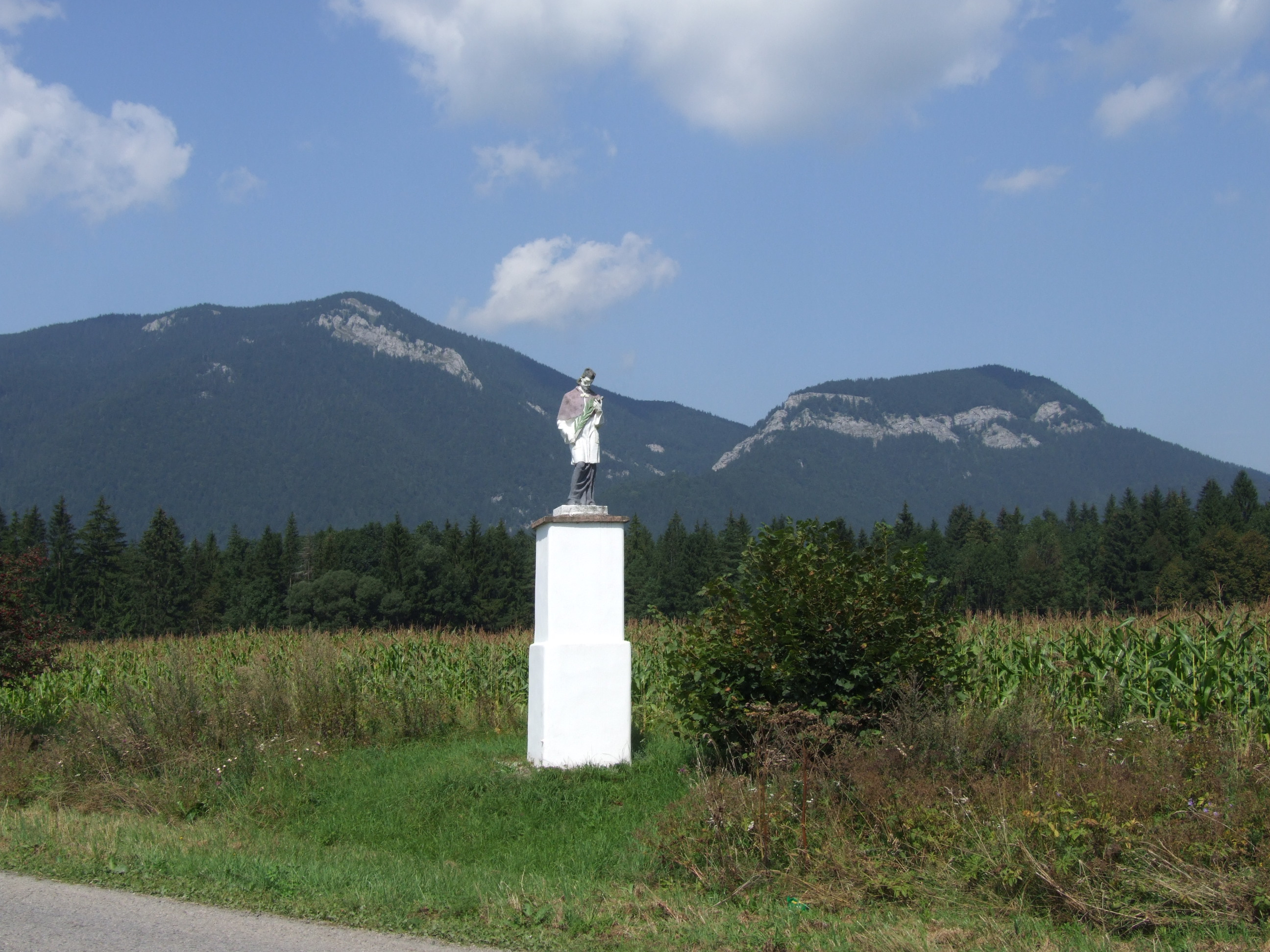 Prosieczne i Hradkovo. Widok z Liptowskich Matiaszowców. Na środku figurka Jana Nepomucena